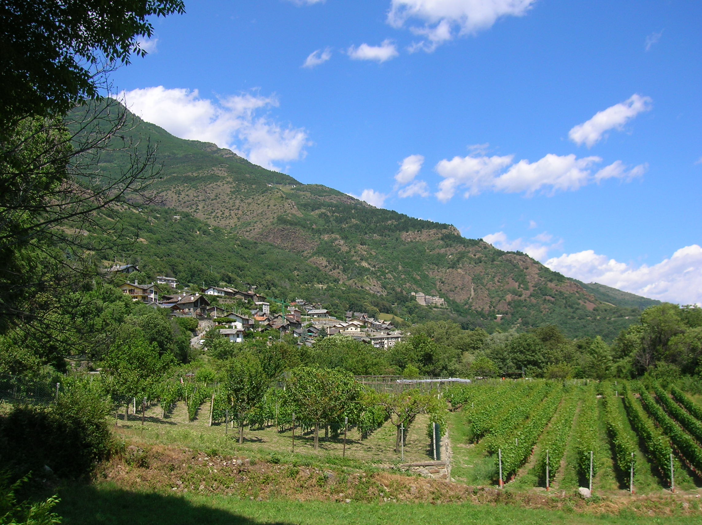 Panorama di Quart, Valle d'Aosta, Italia.